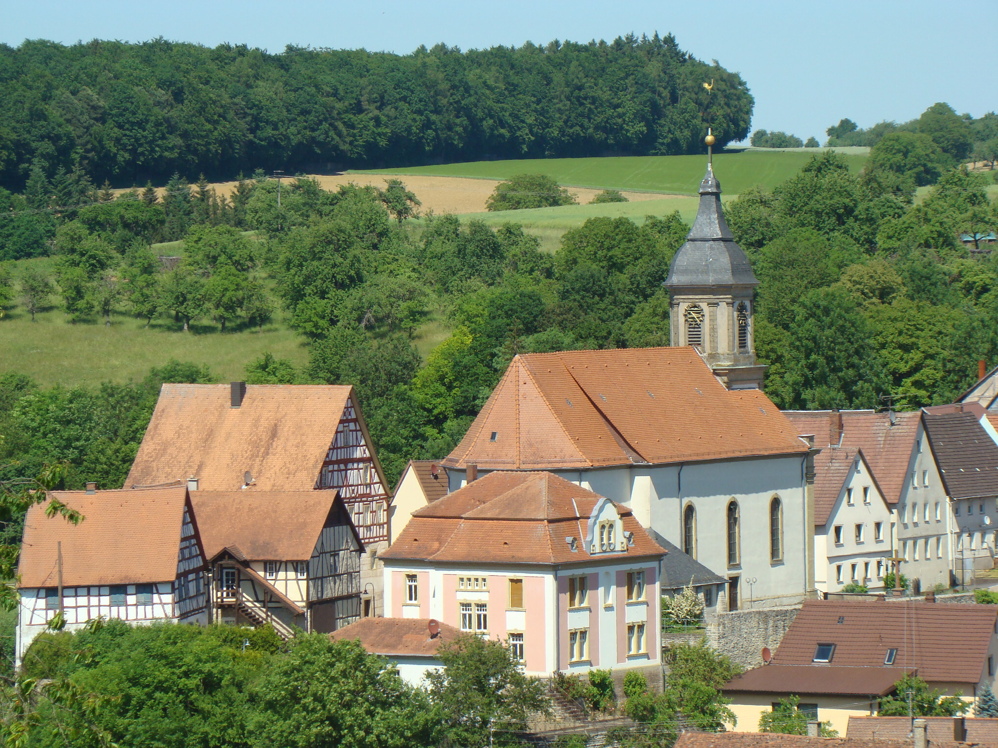 Ravenstein-Ballenberg